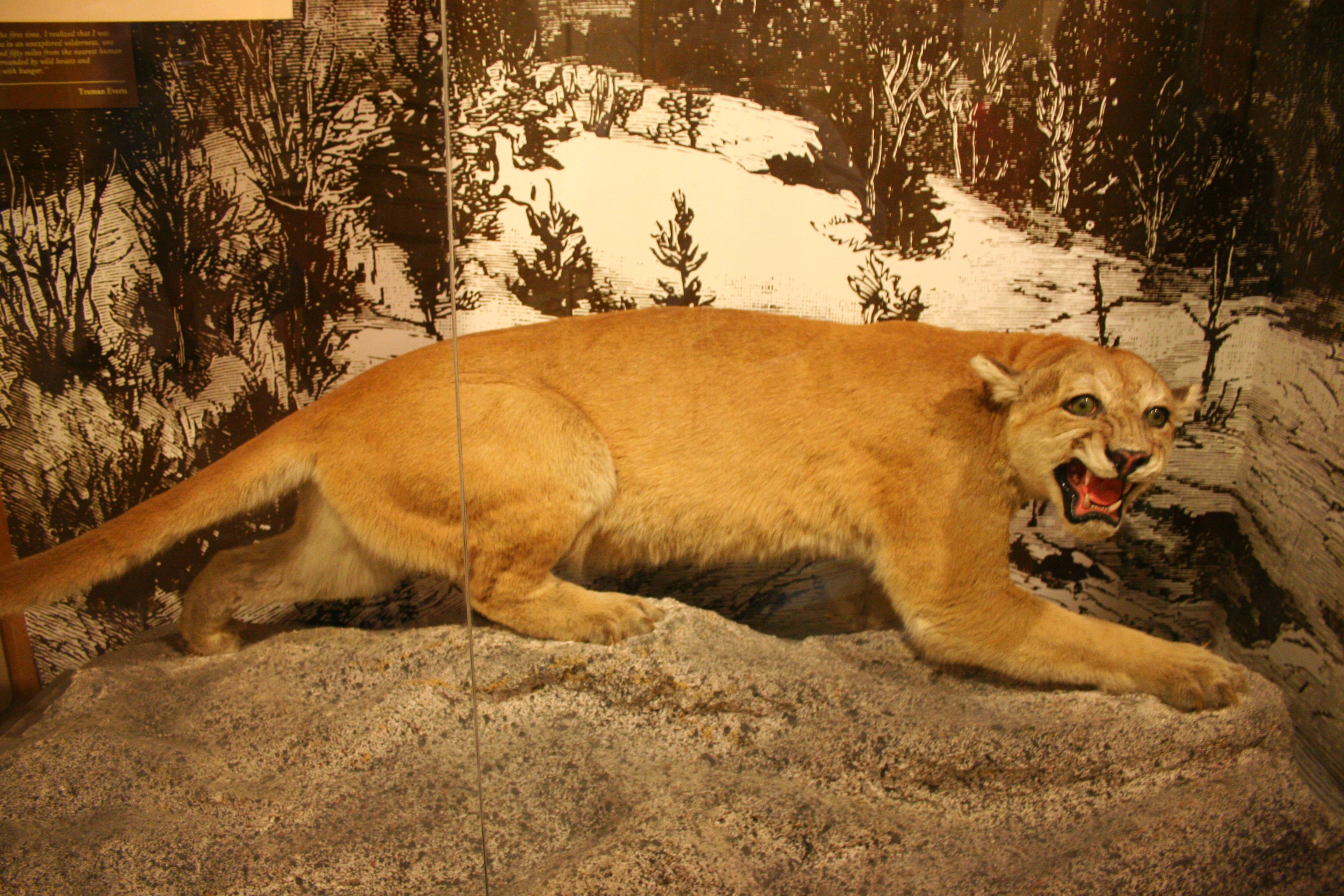 Puma w Albright Visitor Center - Fort Yellowstone